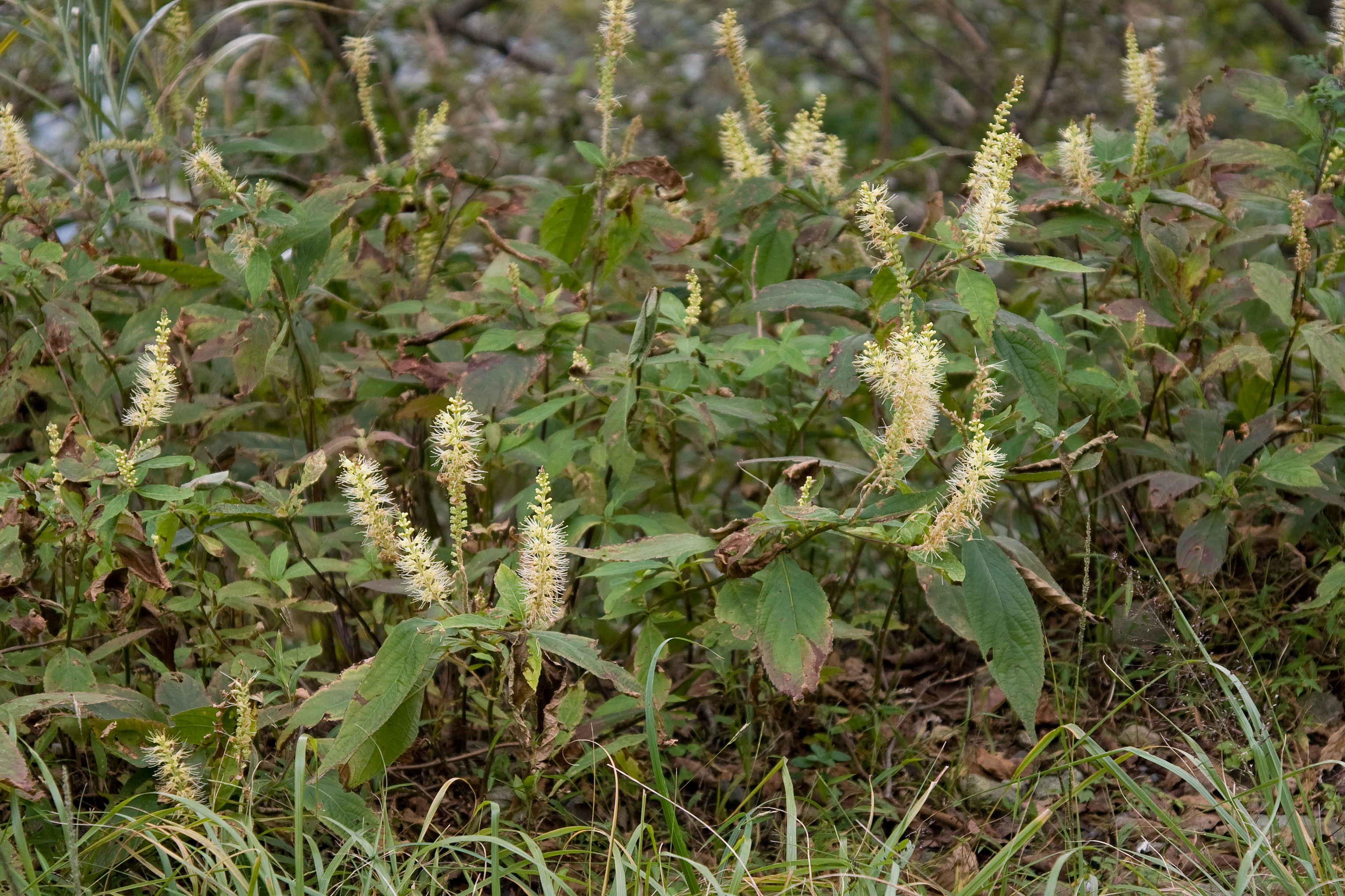 テンニンソウ (学名:Leucosceptrum japonicum)